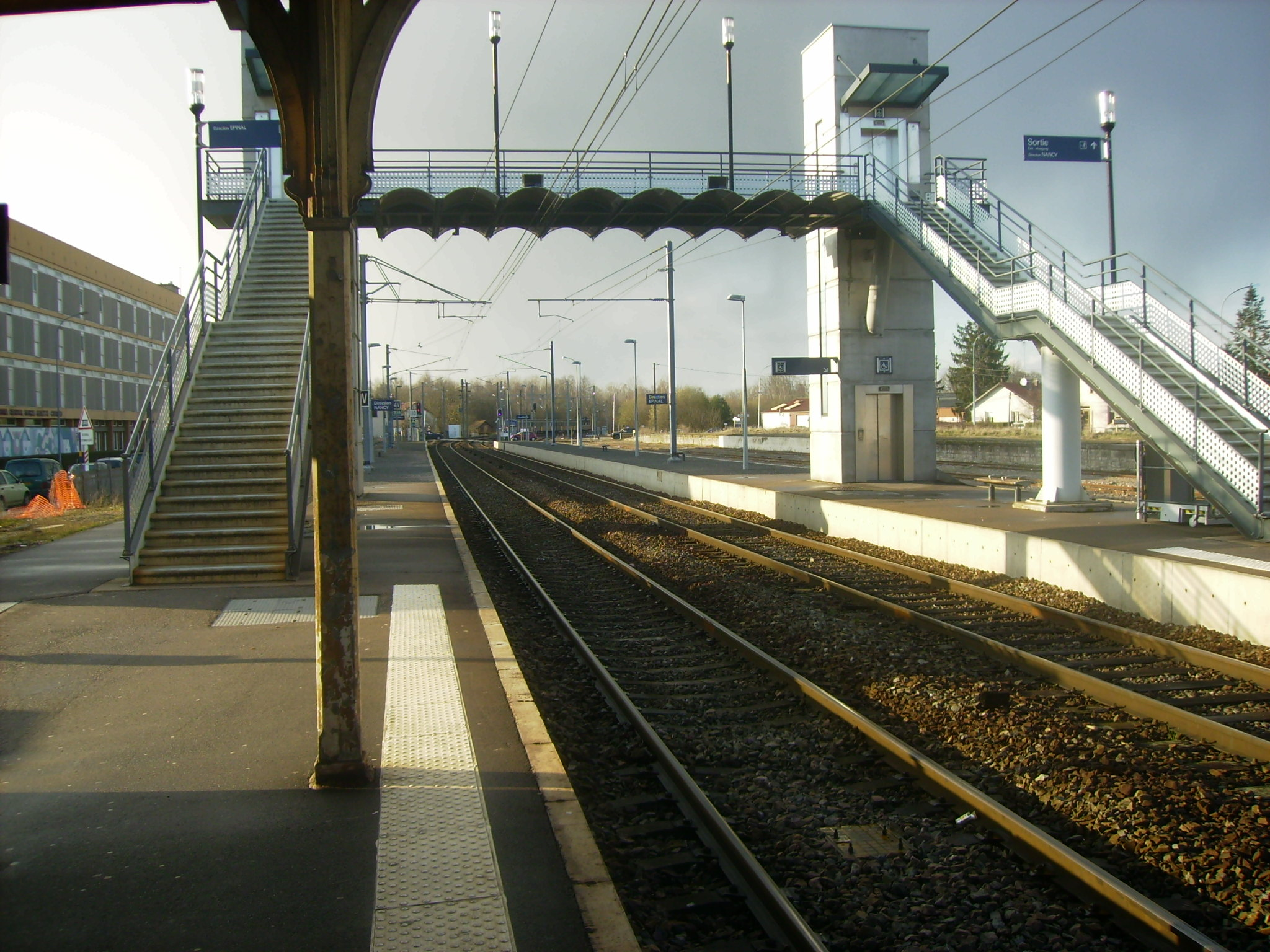 Gare de Charmes, vue en direction de Nancy, sur la gauche, le Lycée Marcel GOulette.